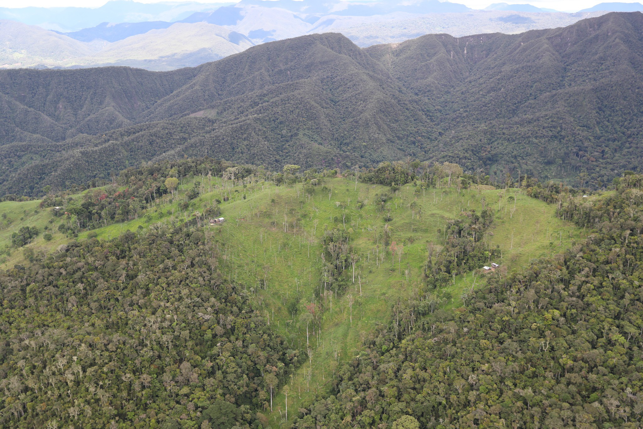 Bosque de protección Alto Mayo